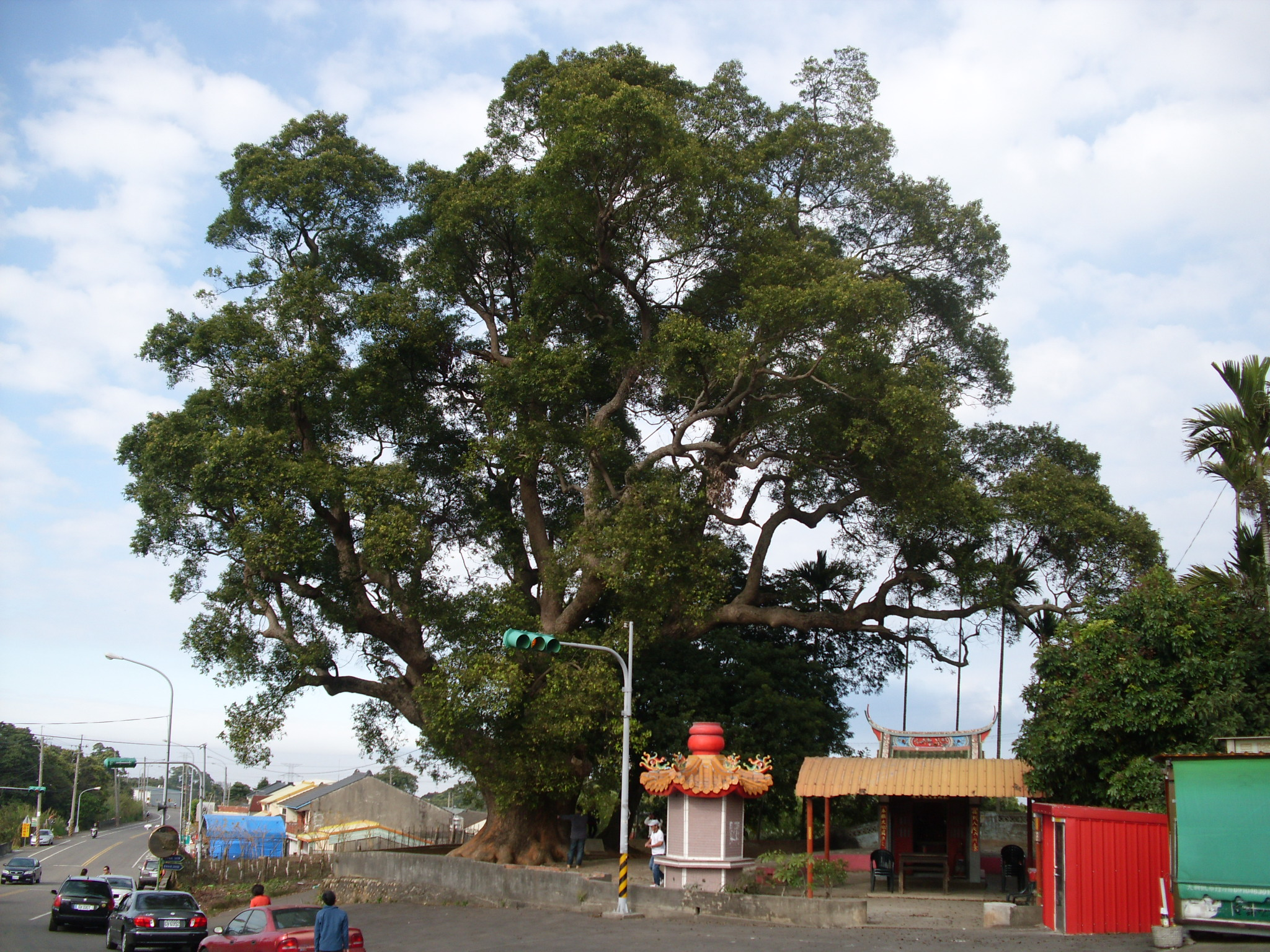 中文（台灣）: 縣道139號33.2k路旁老樟母女樹，位於南投樟普寮（漳浦寮）。